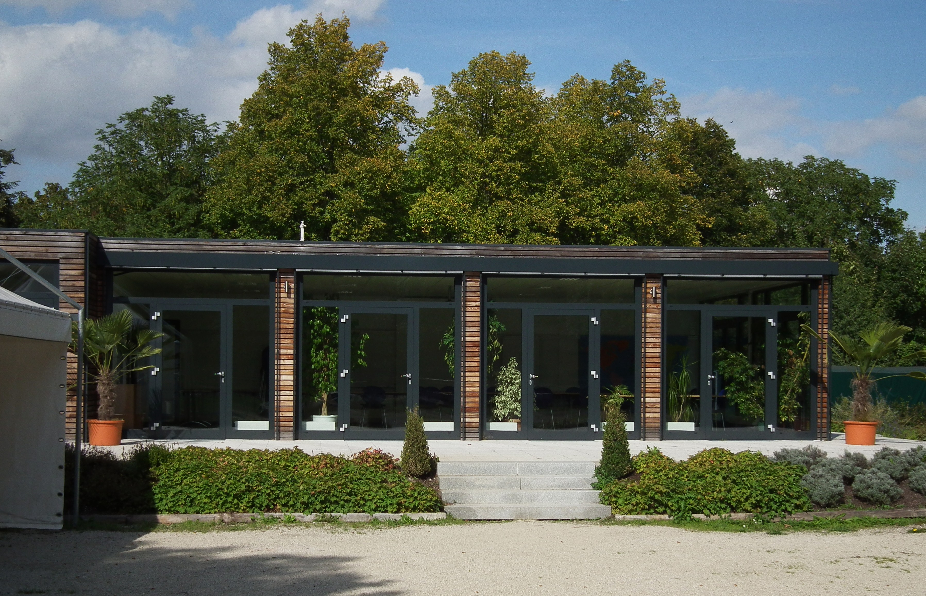 Tiergartenschule im Tiergarten Worms (Rheinland-Pfalz, Deutschland)